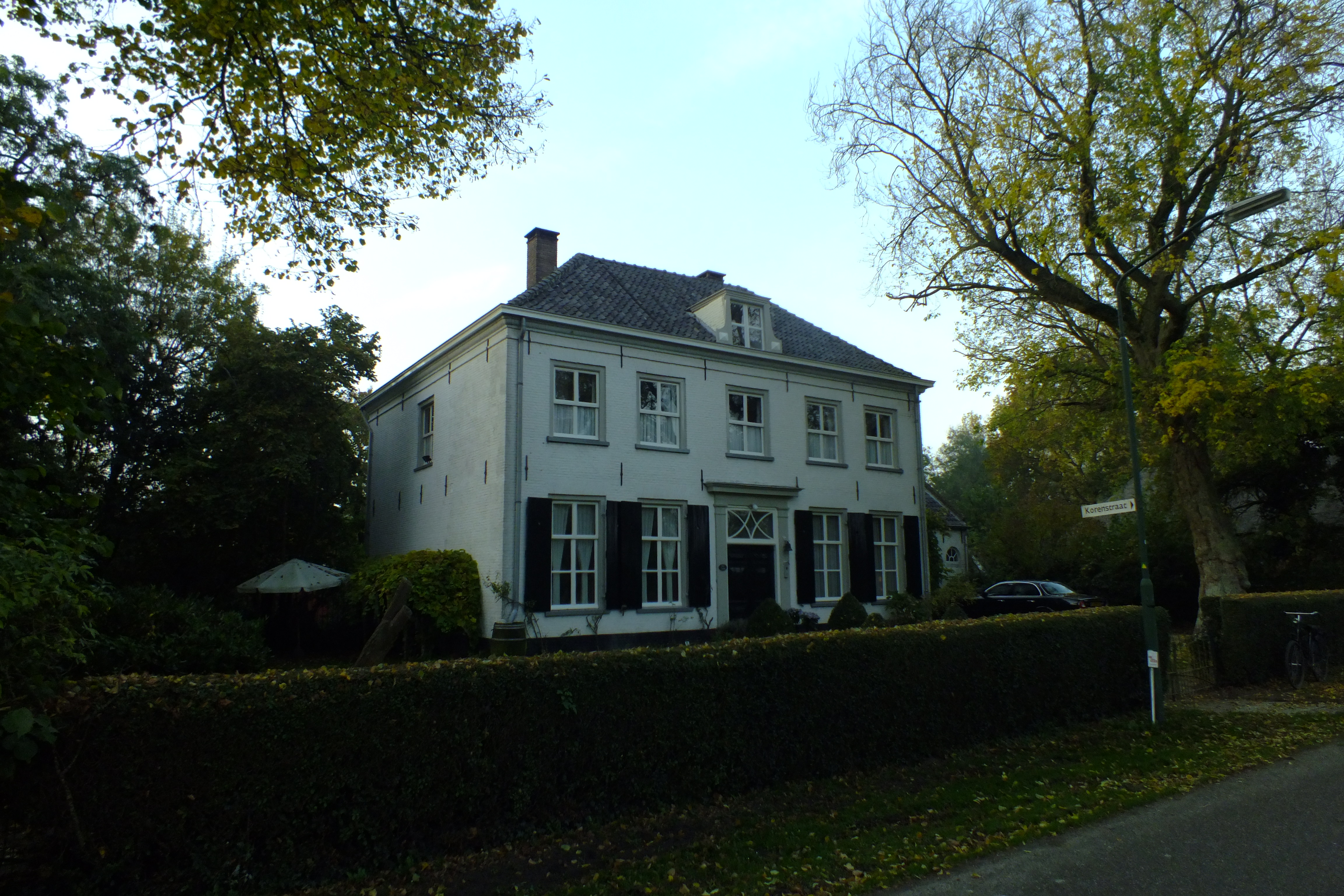 Woonhuis Hamstrastraat 3 Oijen